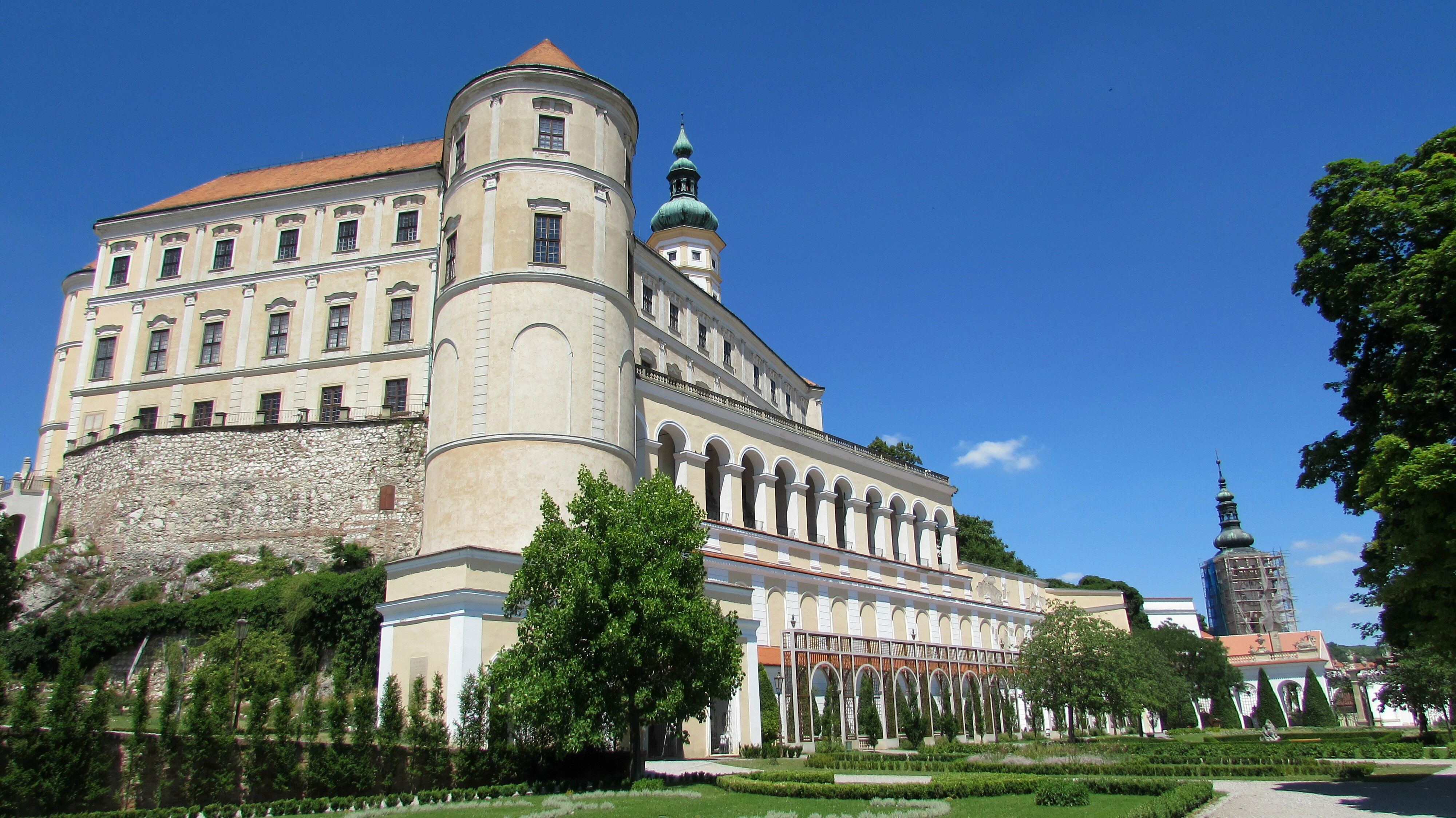 Mikulov Schloss